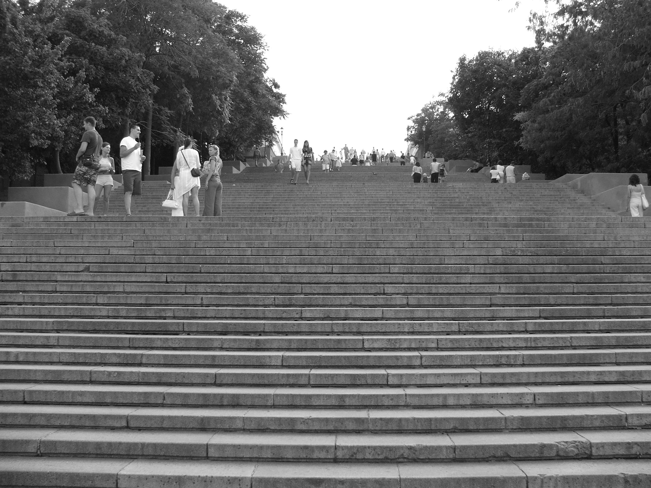 Odessa Ukraine